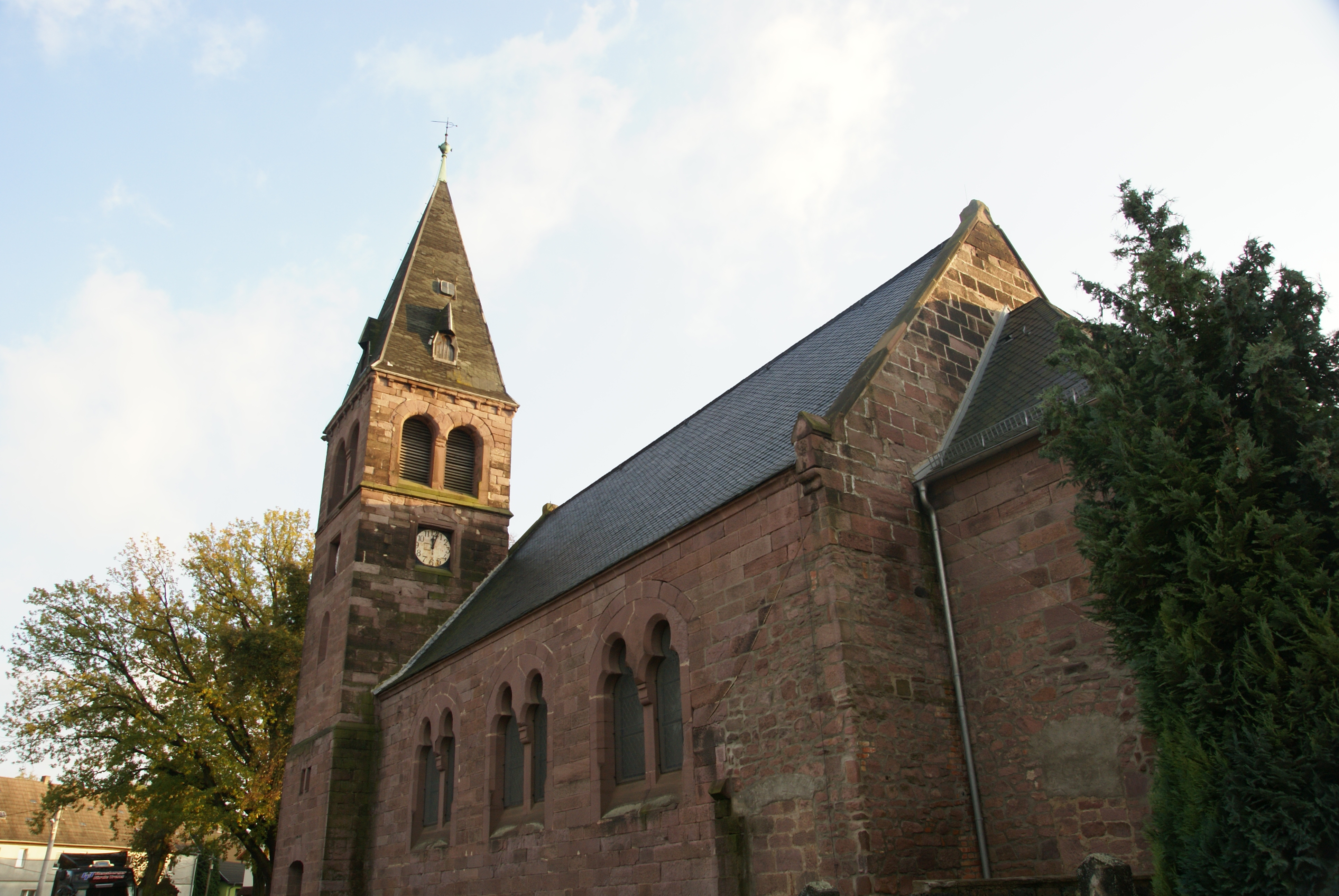 Die Dorfkirche St. Wigbert in Kreisfeld, Gemeinde Hergisdorf, im Landkreis Mansfeld-Südharz